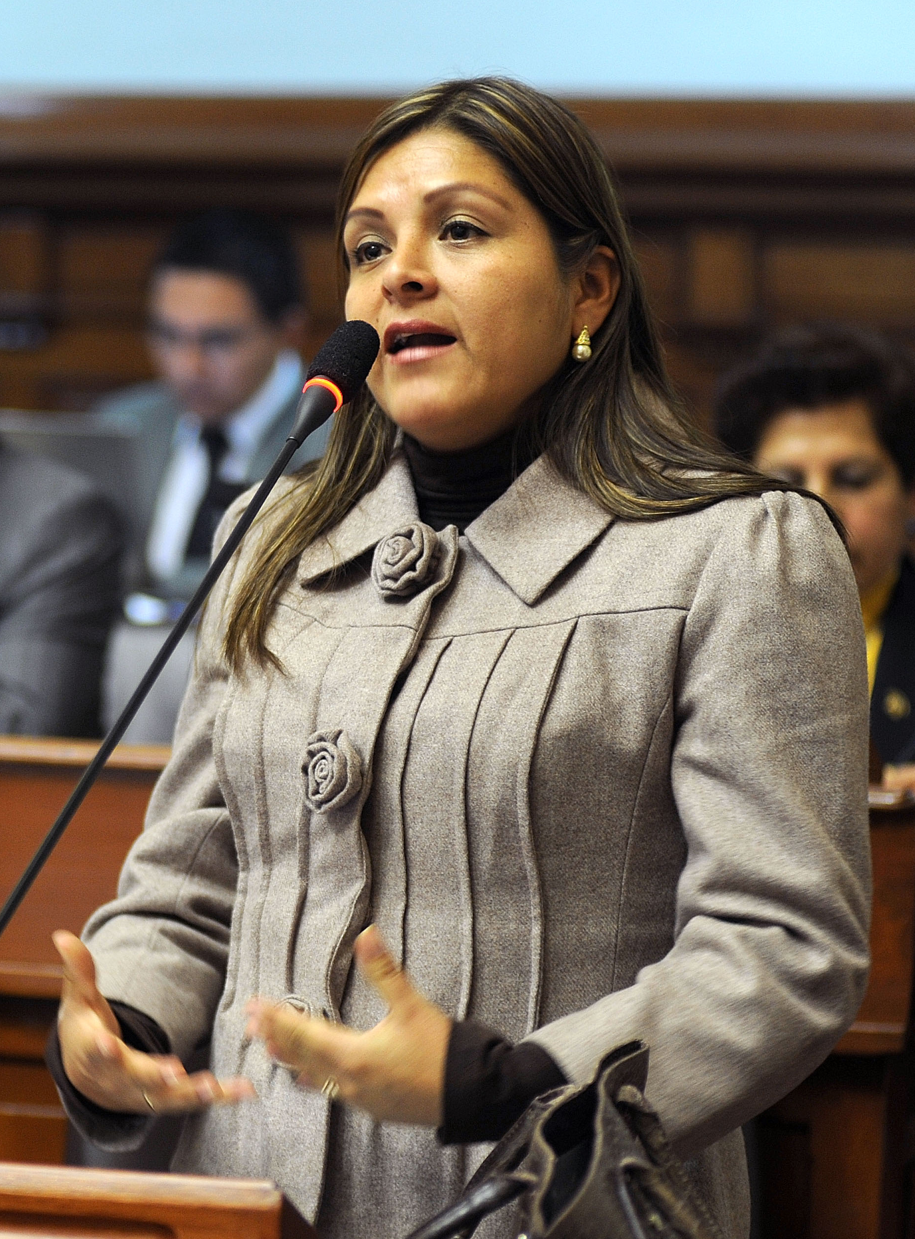 La legisladora Karina Beteta Rubín expresa su posición en el debate parlamentario realizado esta tarde por el Pleno congresal.